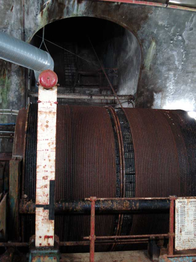 Pozzo Impero, Parco tecnologico archeologico delle colline emetallifere grossetane